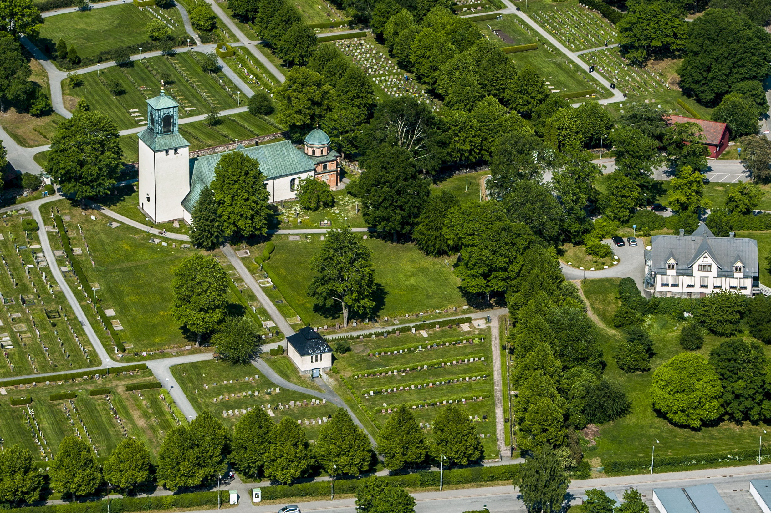 Spånga kyrka från luften, prästgården till höger